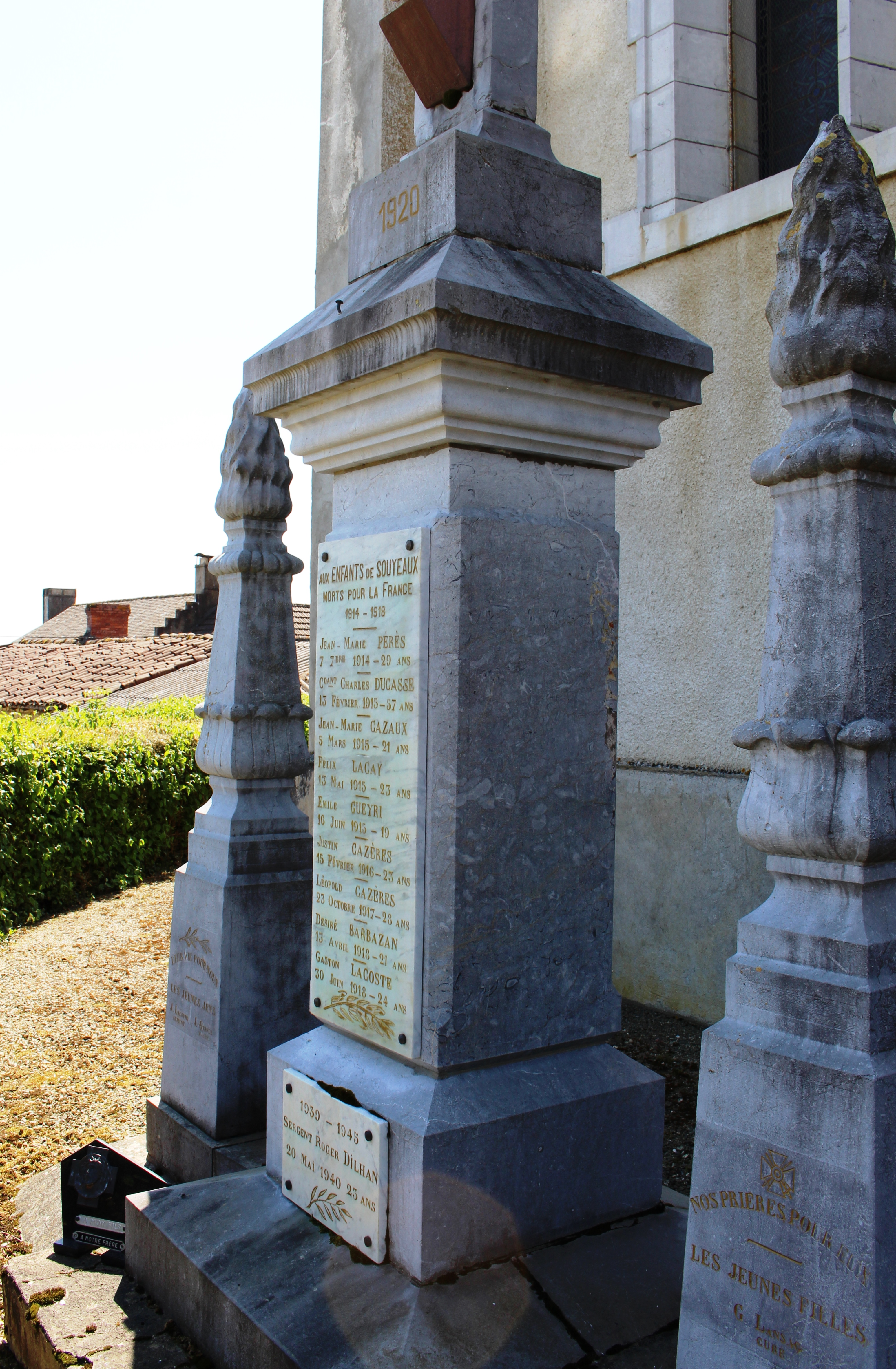 Monument aux morts de Souyeaux (Hautes-Pyrénées)